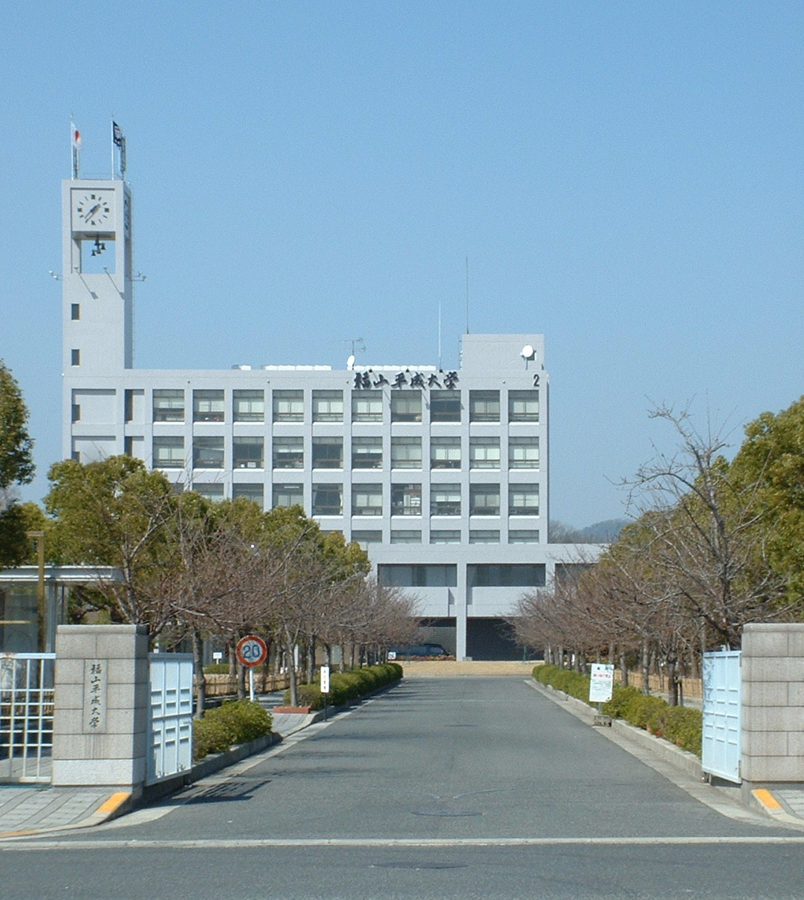 福山平成大学。2006年3月25日に投稿者が撮影